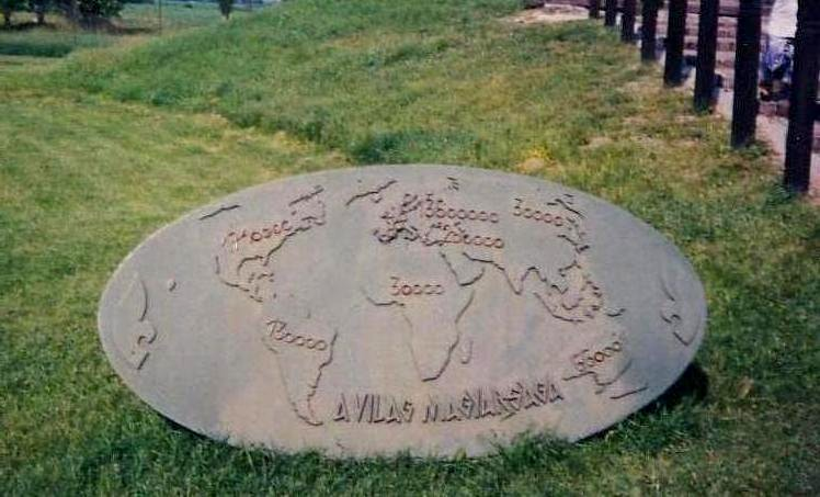 A világ magyarjai Srpskohrvatski / српскохрватски: Mađari u svijetu